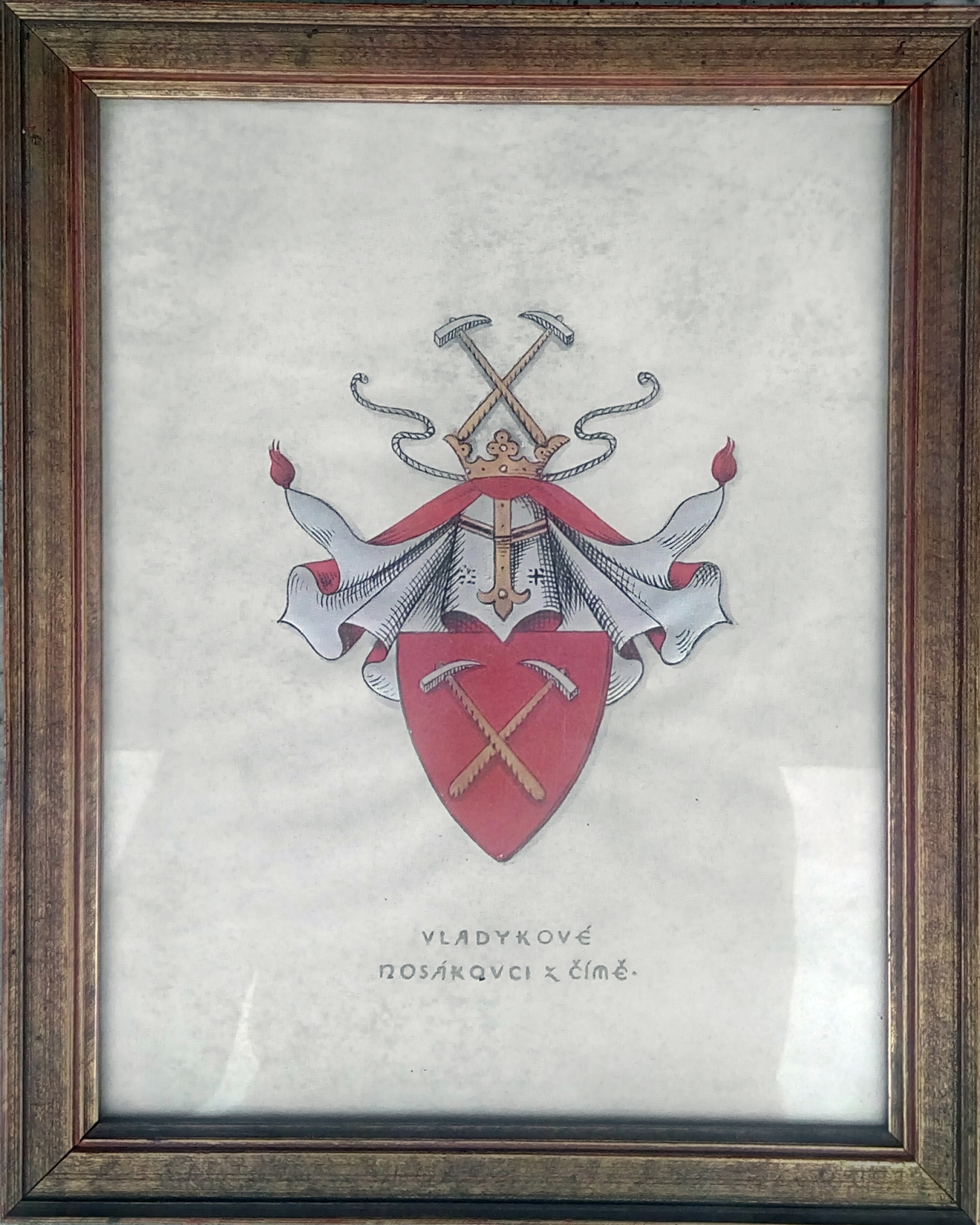 erb Nosákovců z Čímě